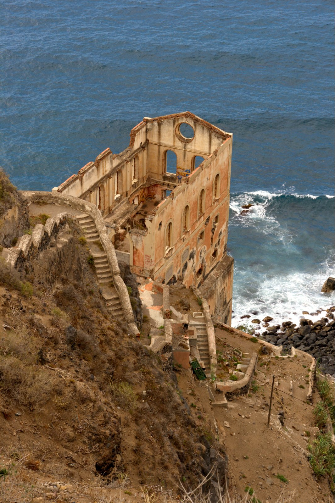 Ruinas de la estación de bombeo (Los Realejos, Tenerife).